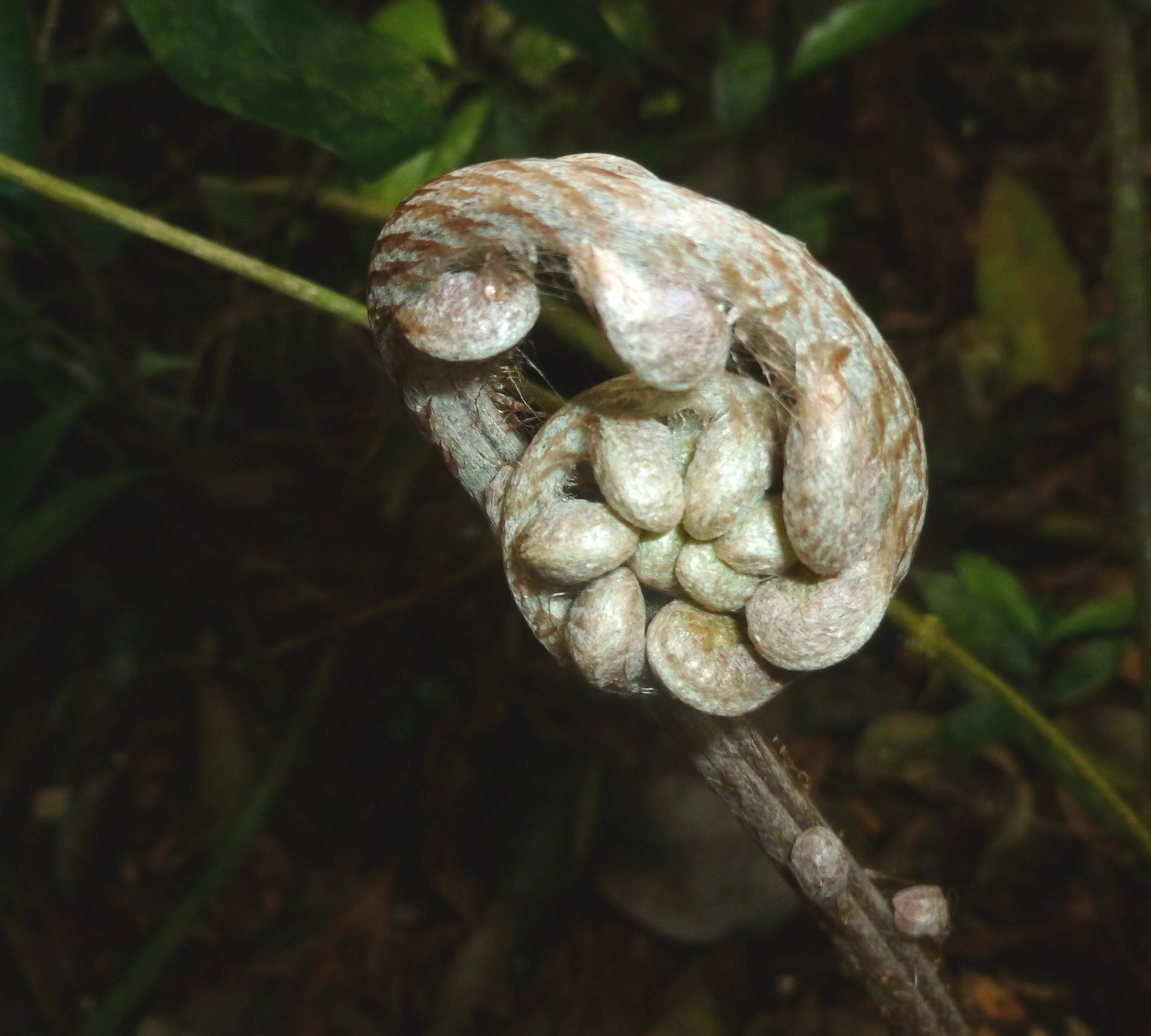 BACULO DE HELECHO ARBORESCENTE de los ESTEROS DEL IBERA ( el segundo mayor humedal del mundo,) provincia de Corrientes, Argentina.